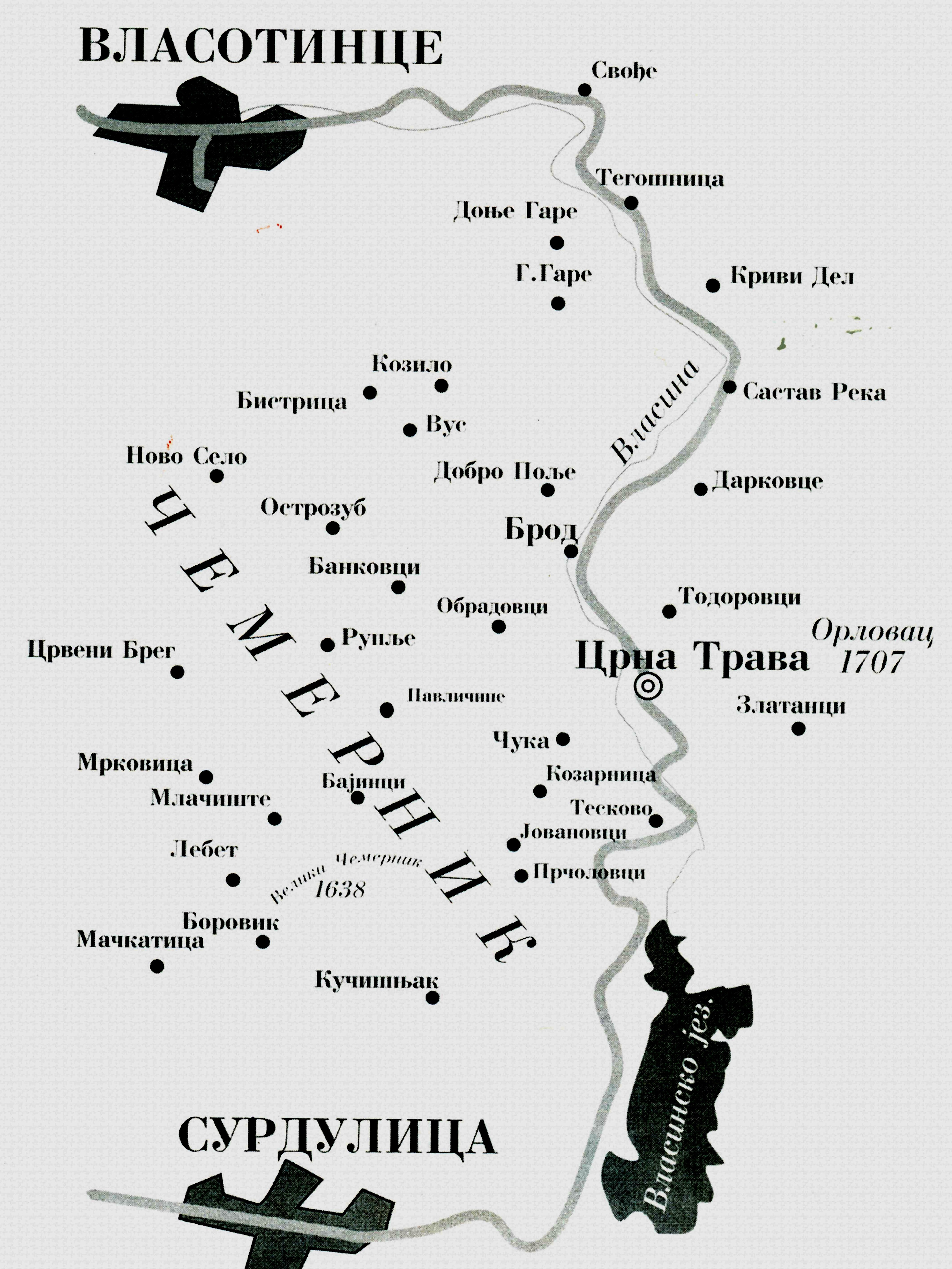 Mapa Crnotravskog govora